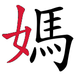 Copie d'écran traitée par Gimp et publiée pour Wikipédia selon les termes de la licence GFDL.